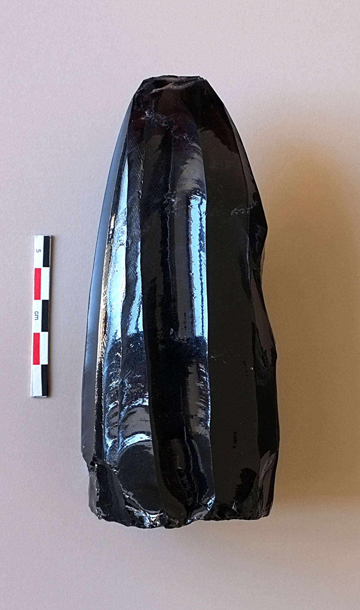 Dəvəgözündən (obsidian) olan nukleus